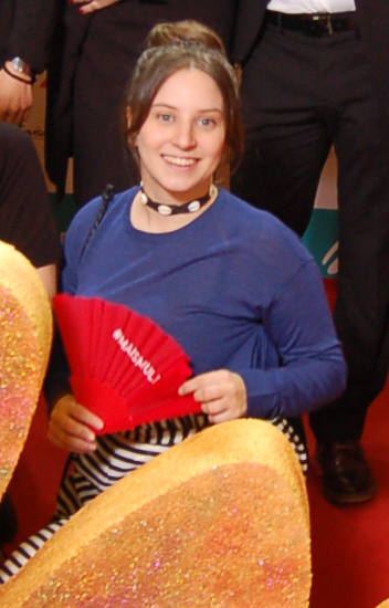 Anxos Fazáns nos Premios Mestre Mateo 2017